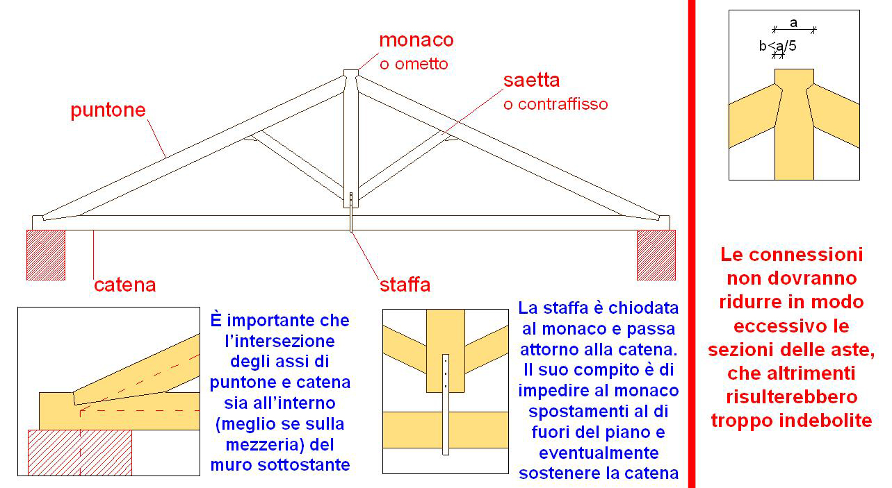 La capriata all'italiana - particolari costruttivi. Elementi e particolari costruttivi di una capriata all'italiana (immagine tratta dalle dispense del corso di Recupero e conservazione degli edifici della Facoltà di Ingegneria dell' Università degli studi di Pavia).